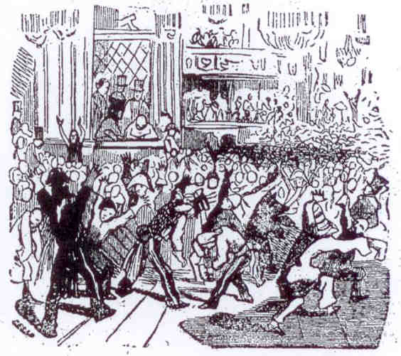 Vue du bal de l'Opéra, célèbre bal du Carnaval de Paris, caricature de Cham.